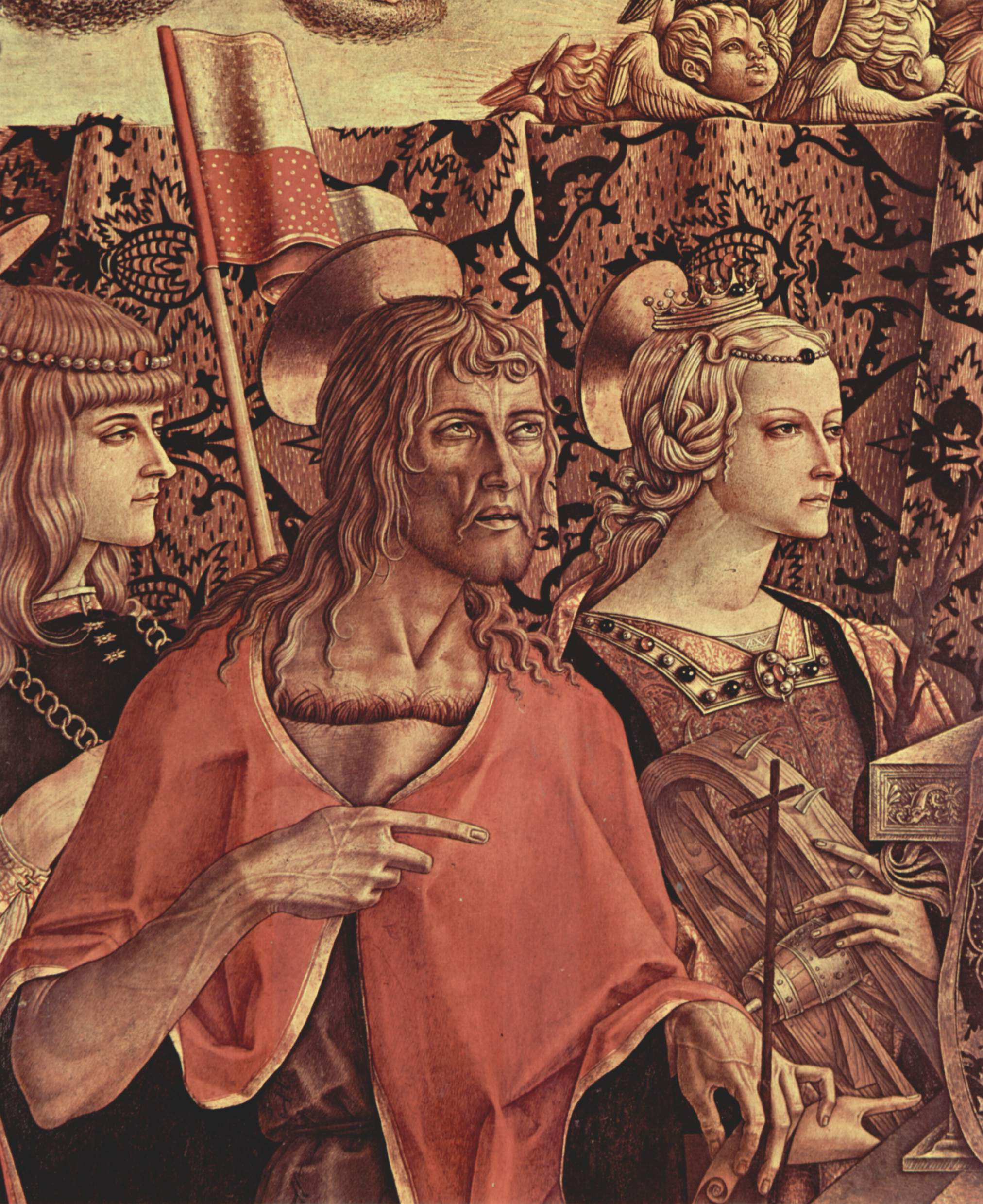 detail: Hl. Venantius, Hl. Johannes der Täufer und Katharina von Alexandrien